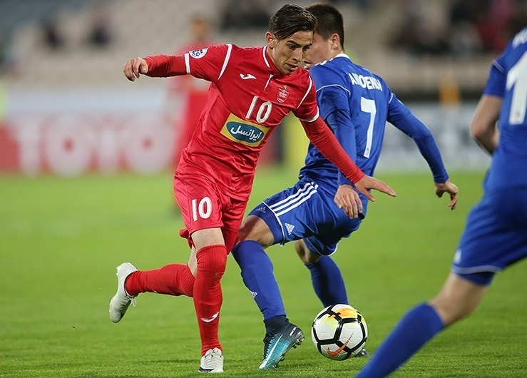 فرشاد احمدزاده در مسابقه پرسپولیس و نسف قارشی در لیگ قهرمانان آسیا ۲۰۱۸